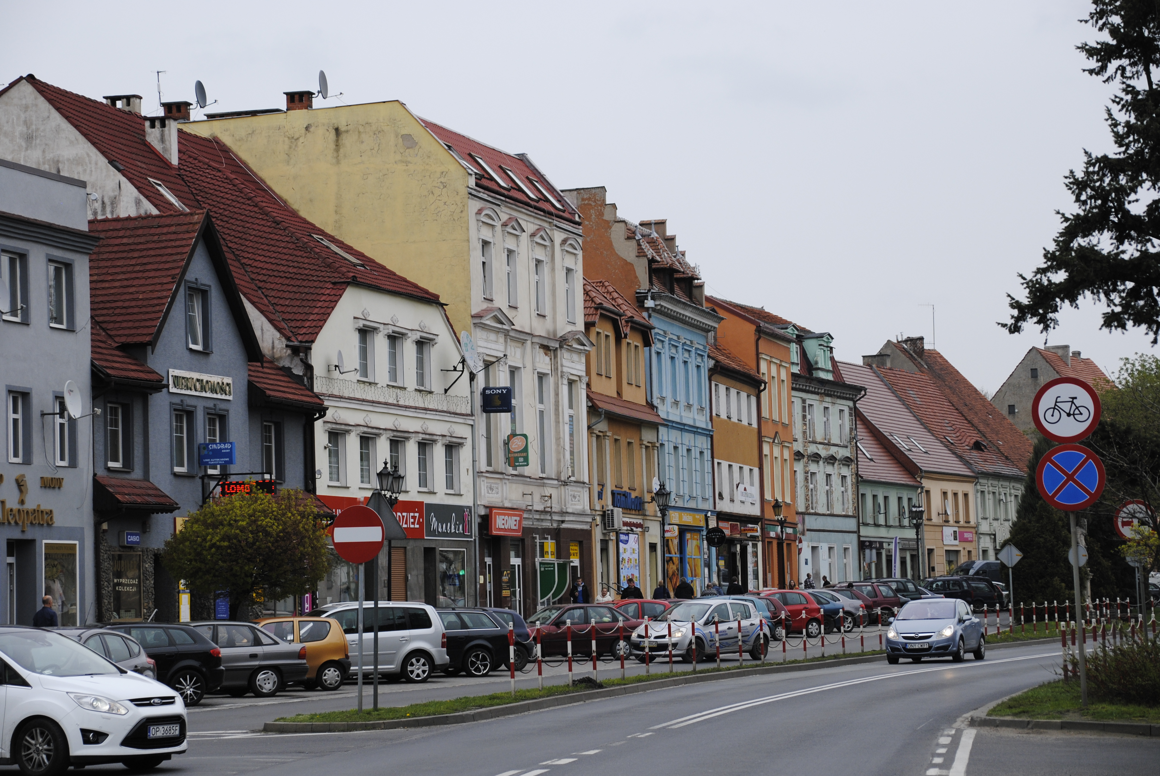 Falkenberg O.S. (poln. Niemodlin) - Ring Nordseite